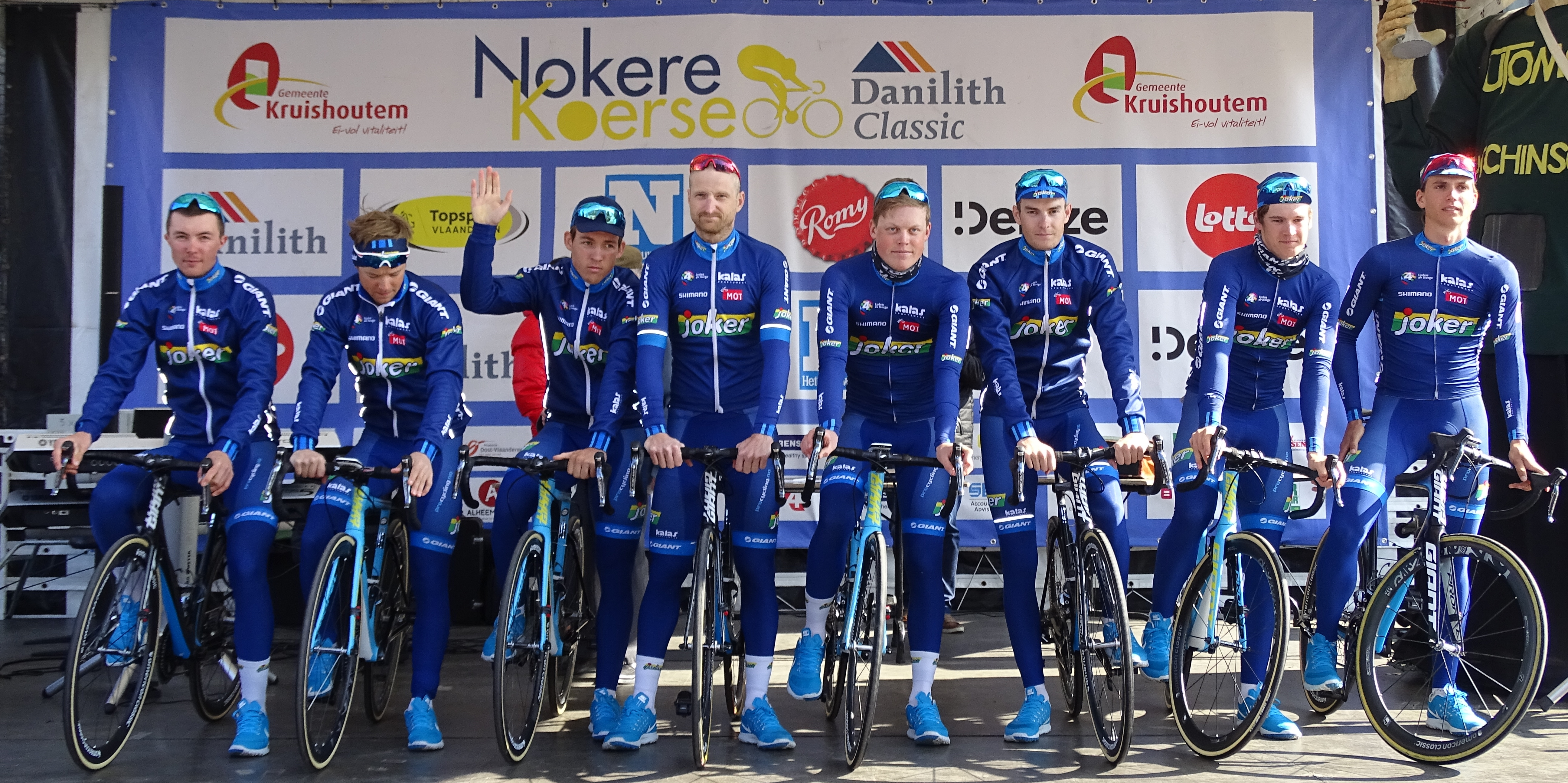 Reportage réalisé le mercredi 16 mars à l'occasion du départ de la Nokere Koerse 2016 à Deinze, Belgique.